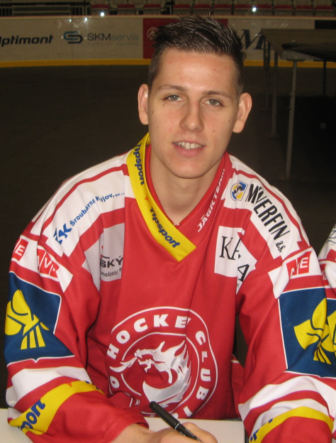 Po zakončení sezóny 2014/15 ve Werk Areně